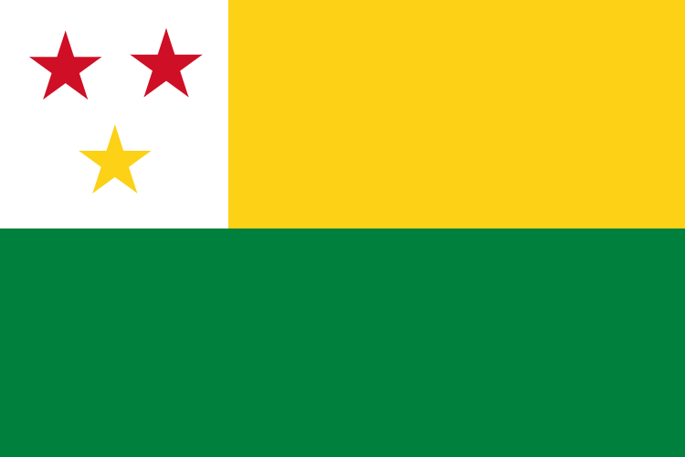 Bandera de Flavio Alfaro